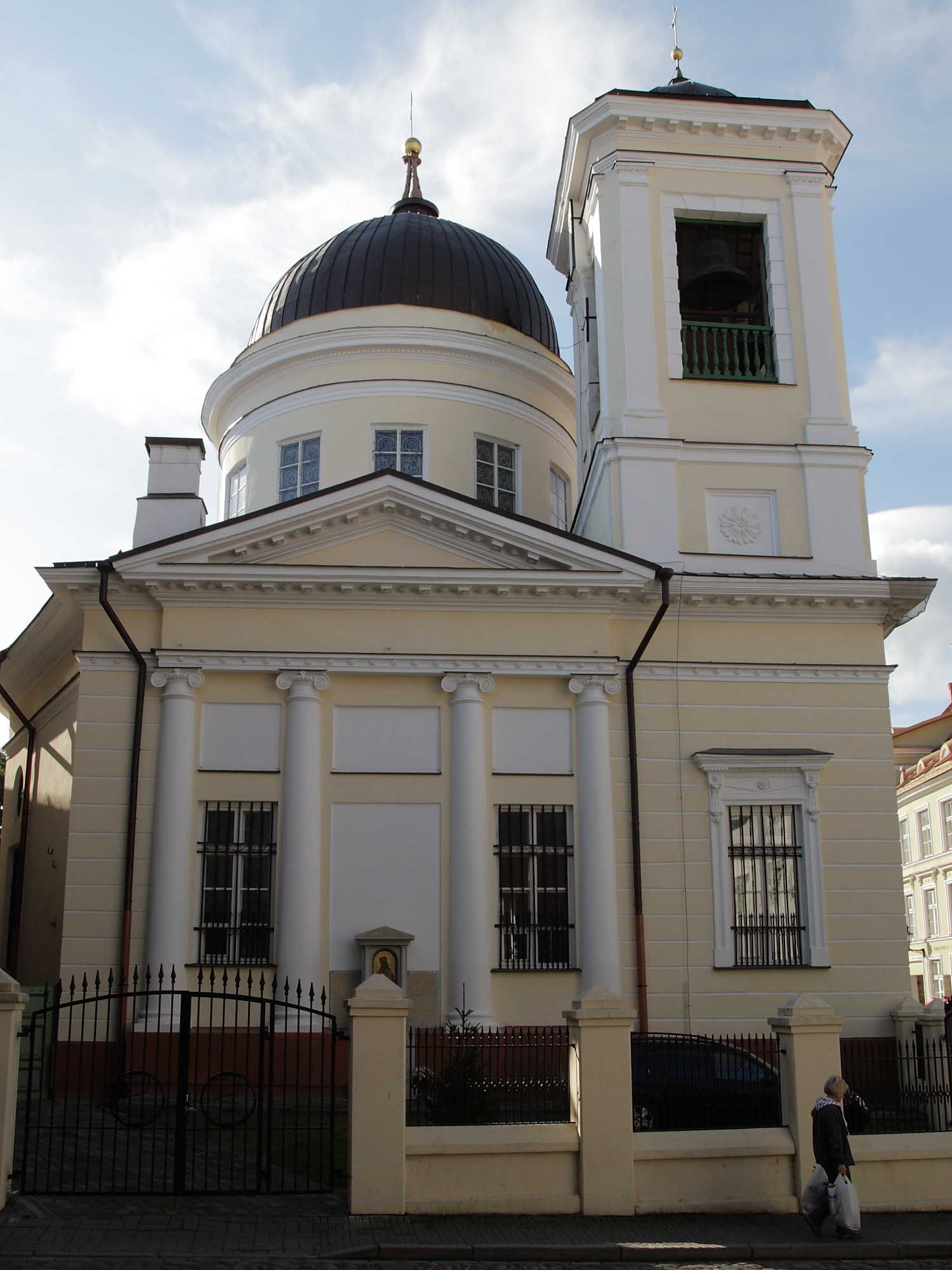 Tallinna Nikolai kirik, 1820-1827